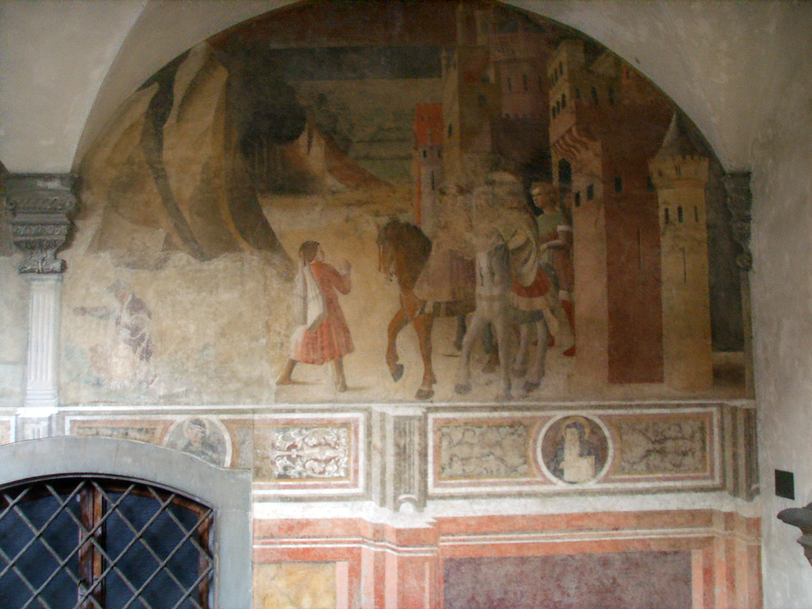 Badia_Fiorentina,_chiostro degli aranci, Storie di San Benedetto, XV century, by unknown Master